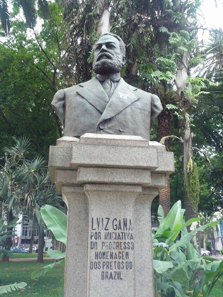 Busto em homenagem a Luiz Gama, maior abolicionista do Brasil, situado no Largo do Arouche, cidade de São Paulo, Brasil. Inaugurado em 1884.